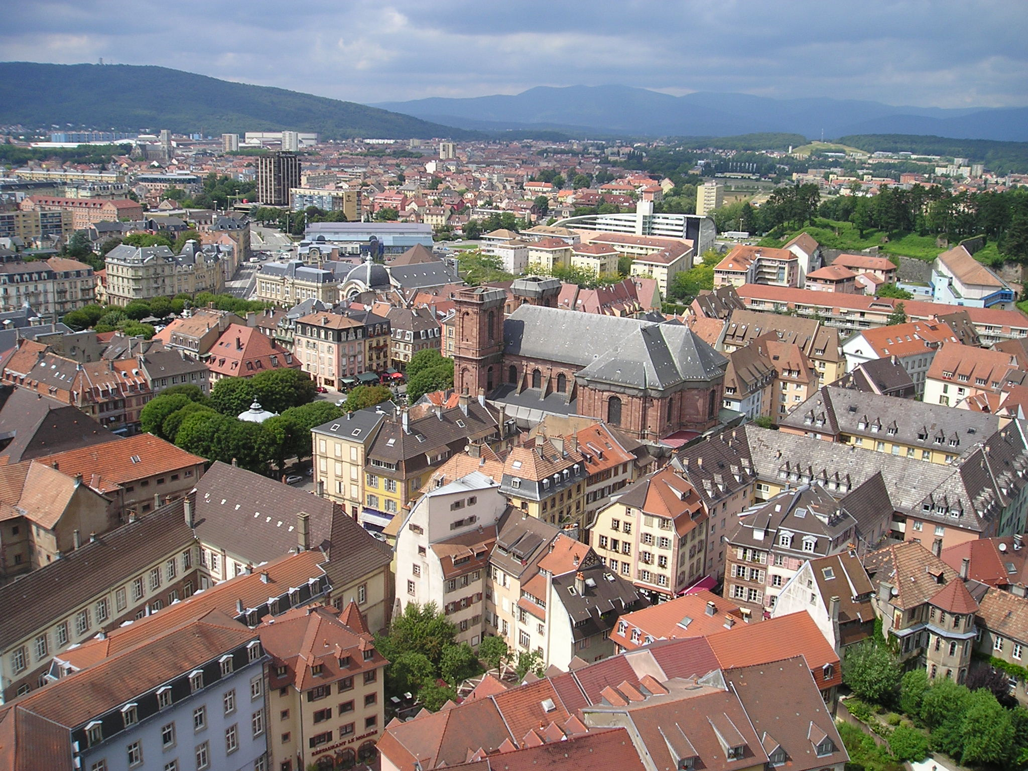 Belfort mit Kathedrale Saint-Christophe